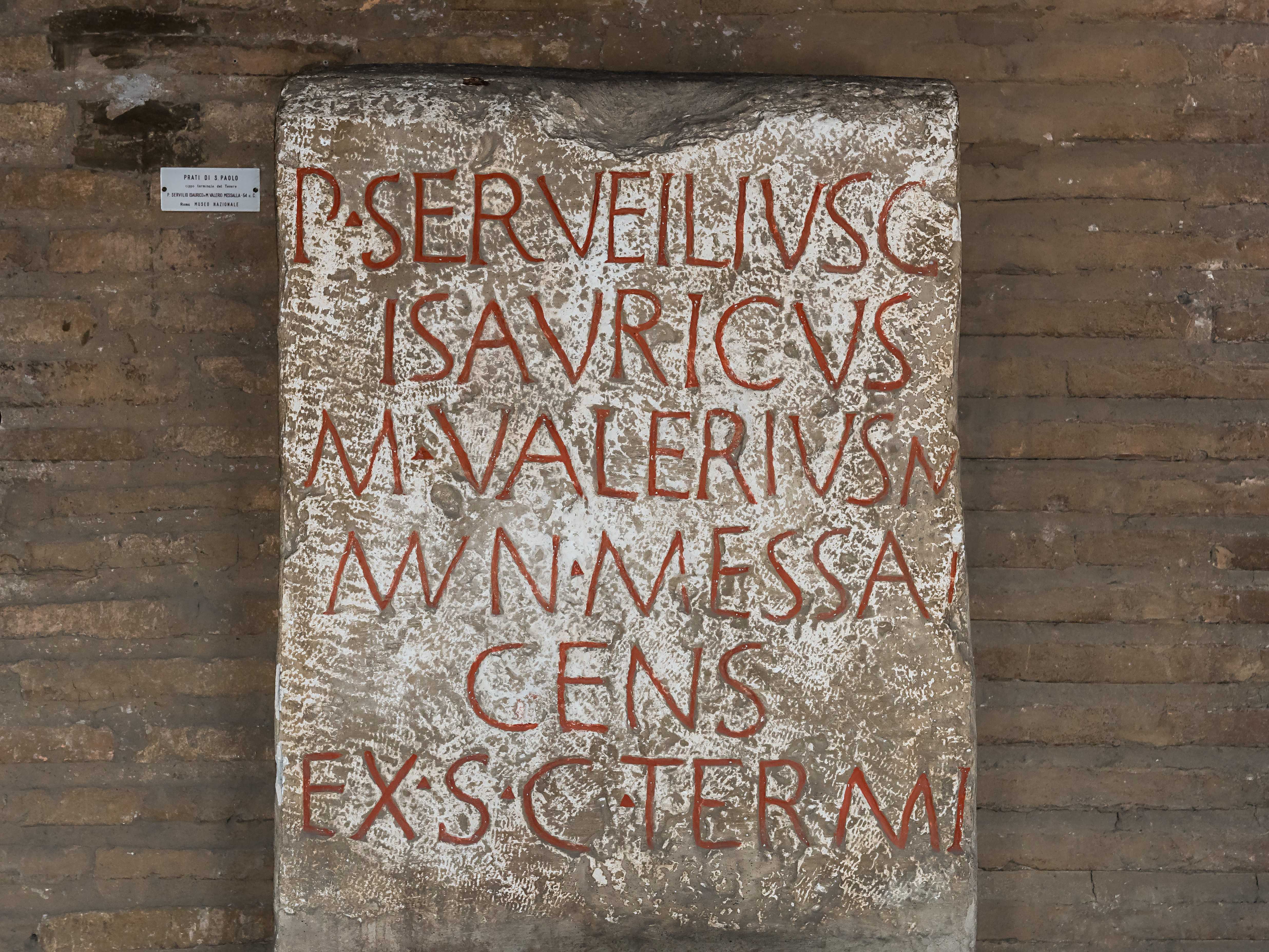 Anlässlich der großen Tiberüberschwemmung im Jahr 54 v. Chr., wurden die Zensoren Publius Servilius Vatia und Marcus Valerius Messalla Niger auf Beschluss des Senats von Rom mit der Stromregulierung beauftragt. Die Inschrift des Tibergrenzsteins nennt die Zensoren sowie den ihnen aufgetragenen und ausgeführten Senatsbeschluss (Senatus consultum).